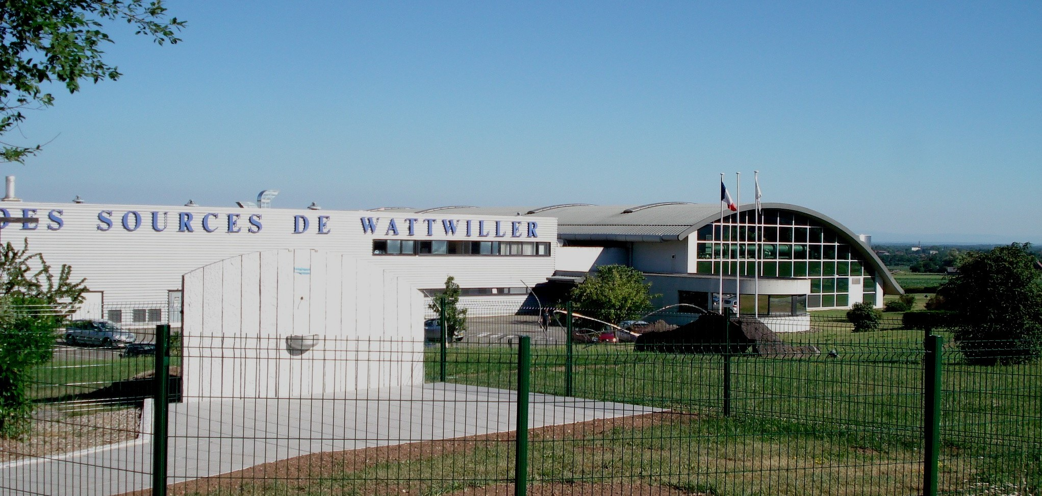 Wattwiller Grandes Sources Usine d'embouteillage